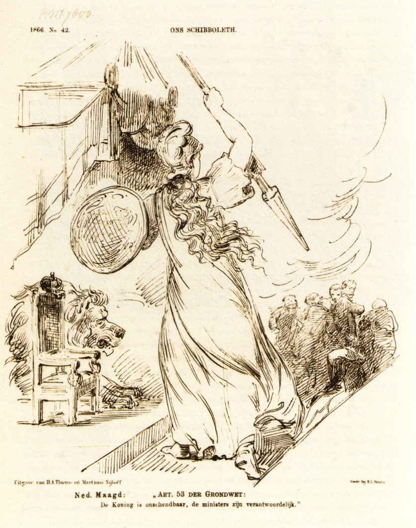 Spotprent 'Ons Schibboleth', De Nederlandsche Spectator, 1866